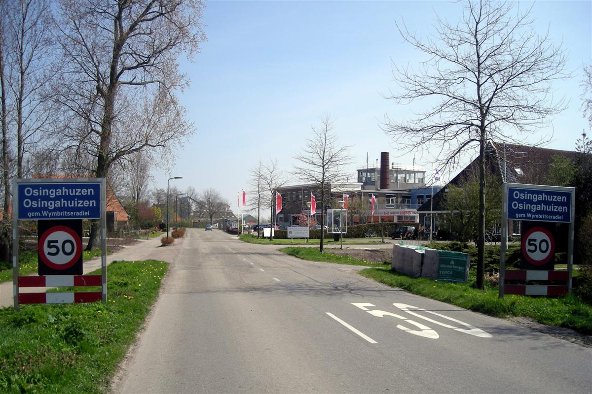 Osingahuizen